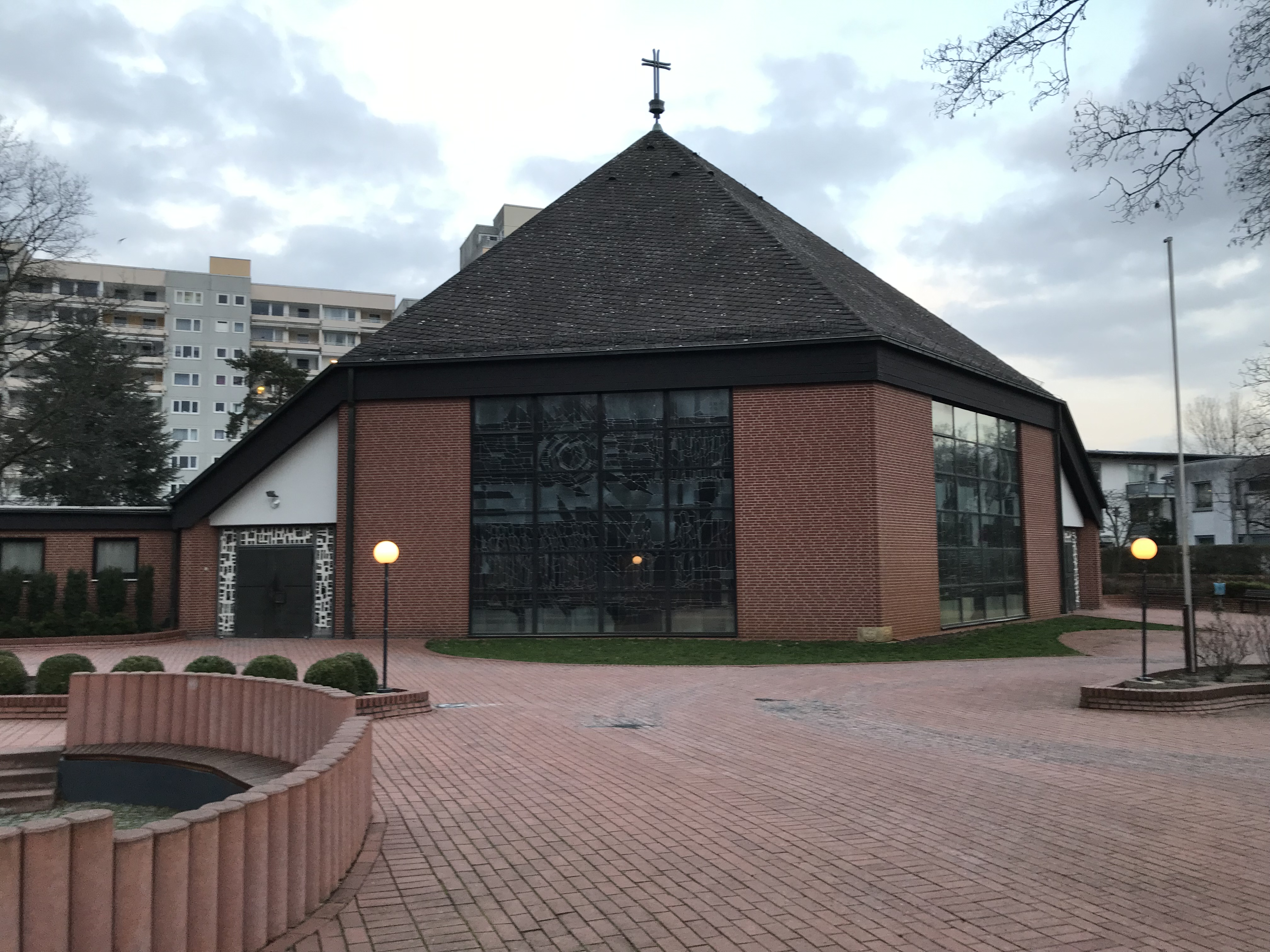 Außenansicht der St. Martin Kirche